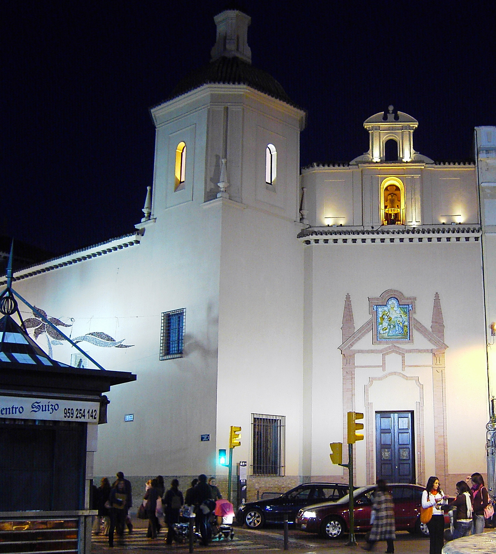 Convento de las Agustianas, Huelva.